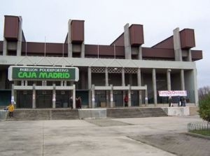 foto del exterior del pabellon polideportivo Cajamadrid